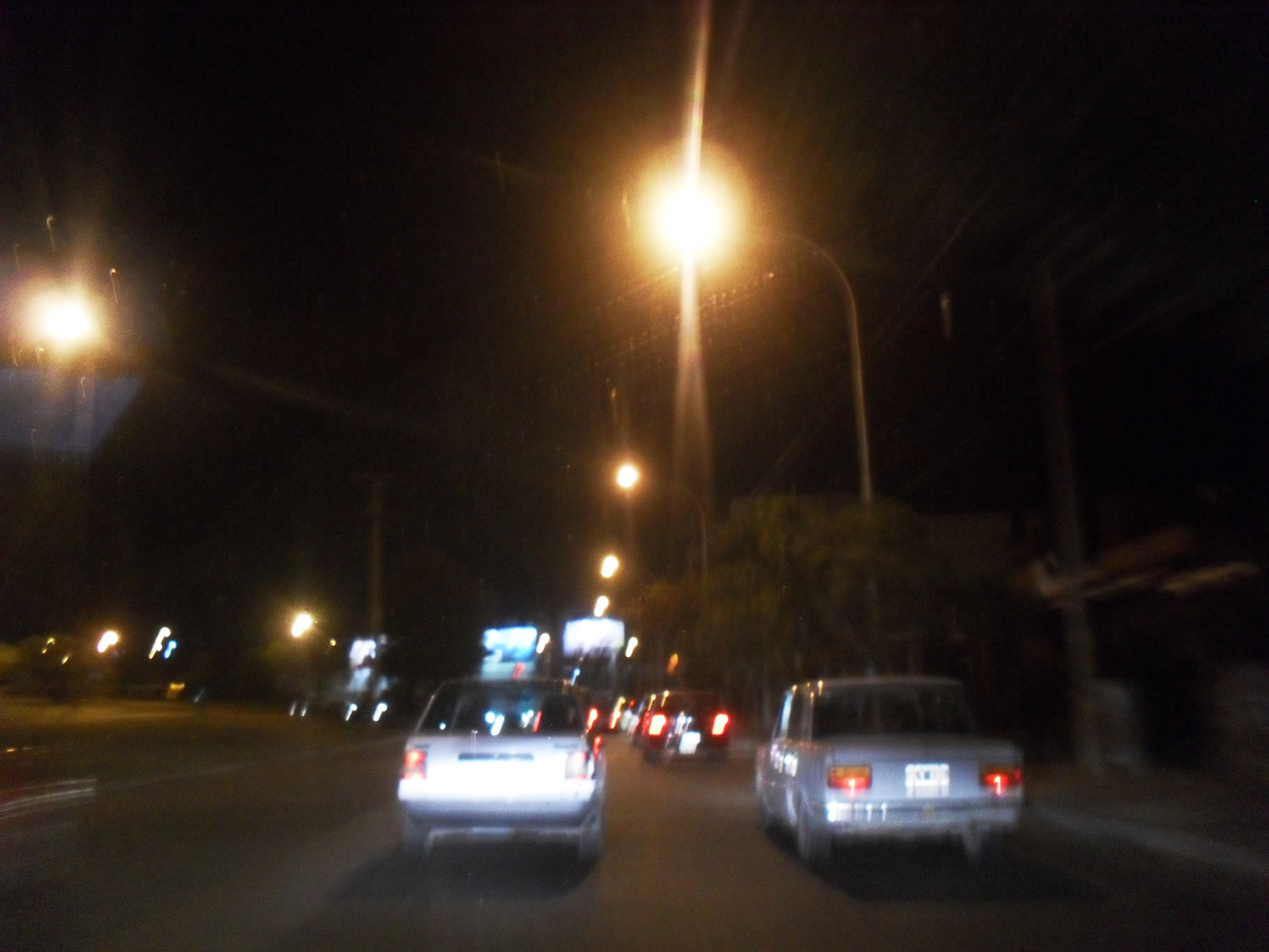 Avenida Sagrada Familia de noche